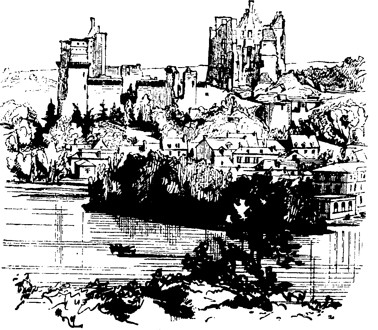 Dessin extrait de l'ouvrage Description du château de Pierrefonds, Paris : Bance, 1857, par Eugène Viollet-le-Duc.